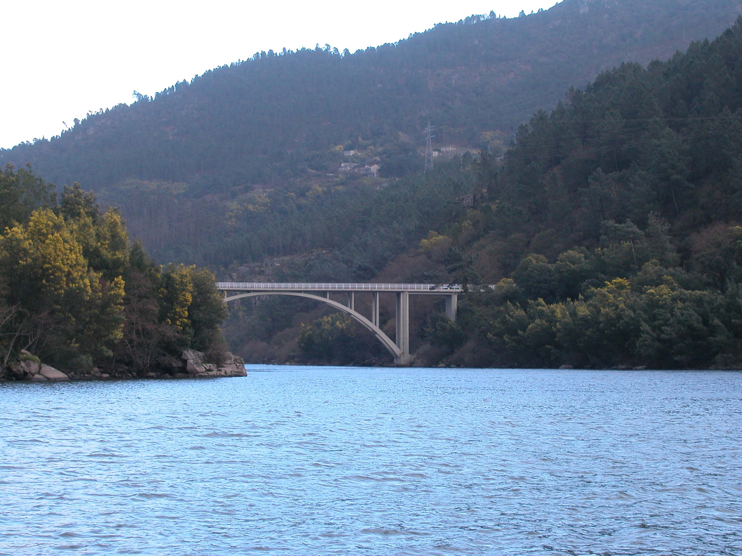 A Barca Ribadavia - Ourense - Galicia - Spain. Desembocadura do Río Avia no Río Miño